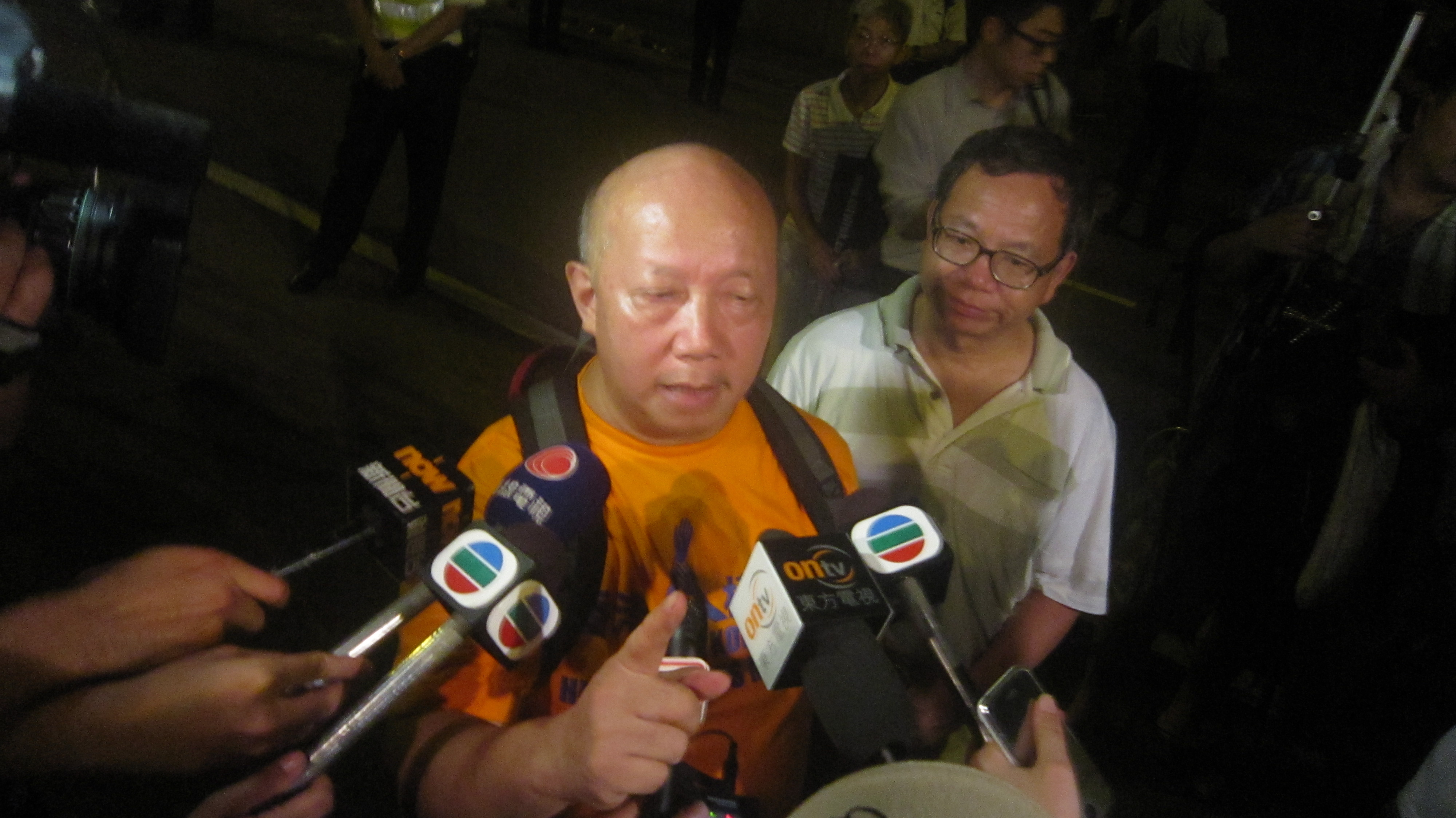 中文（香港）: 香港人權監察總幹事羅沃啟